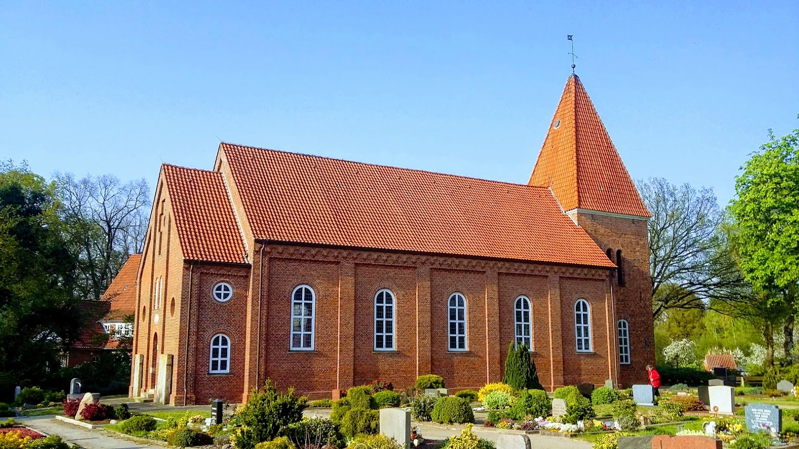 St.-Luciar-Kirche Meyenburg